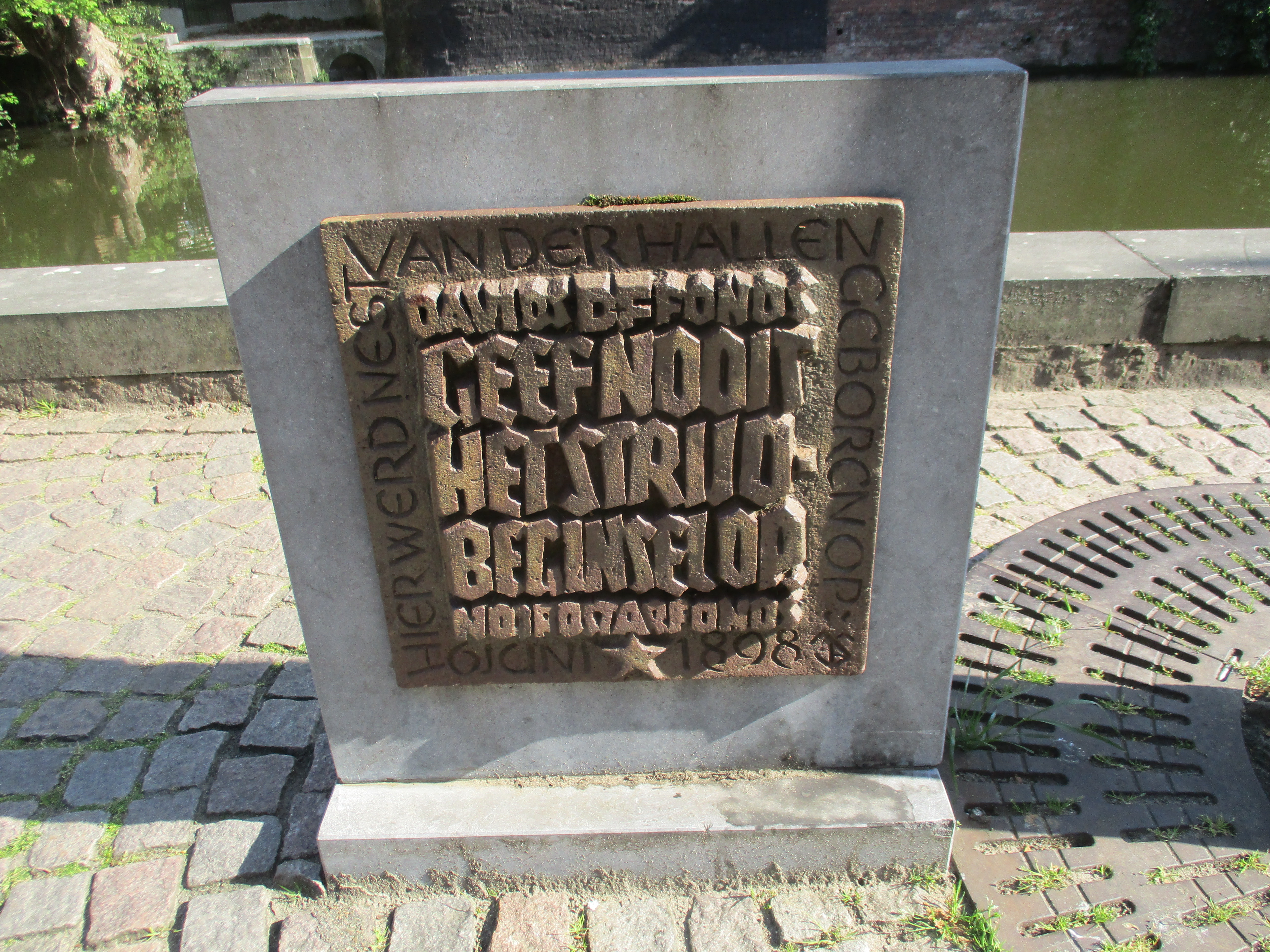 Gedenkplaat Ernest Van der Hallen